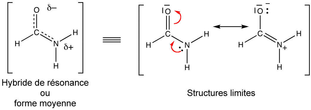 forme moyenne et formes limites du formamide [H2NC(H)=O]